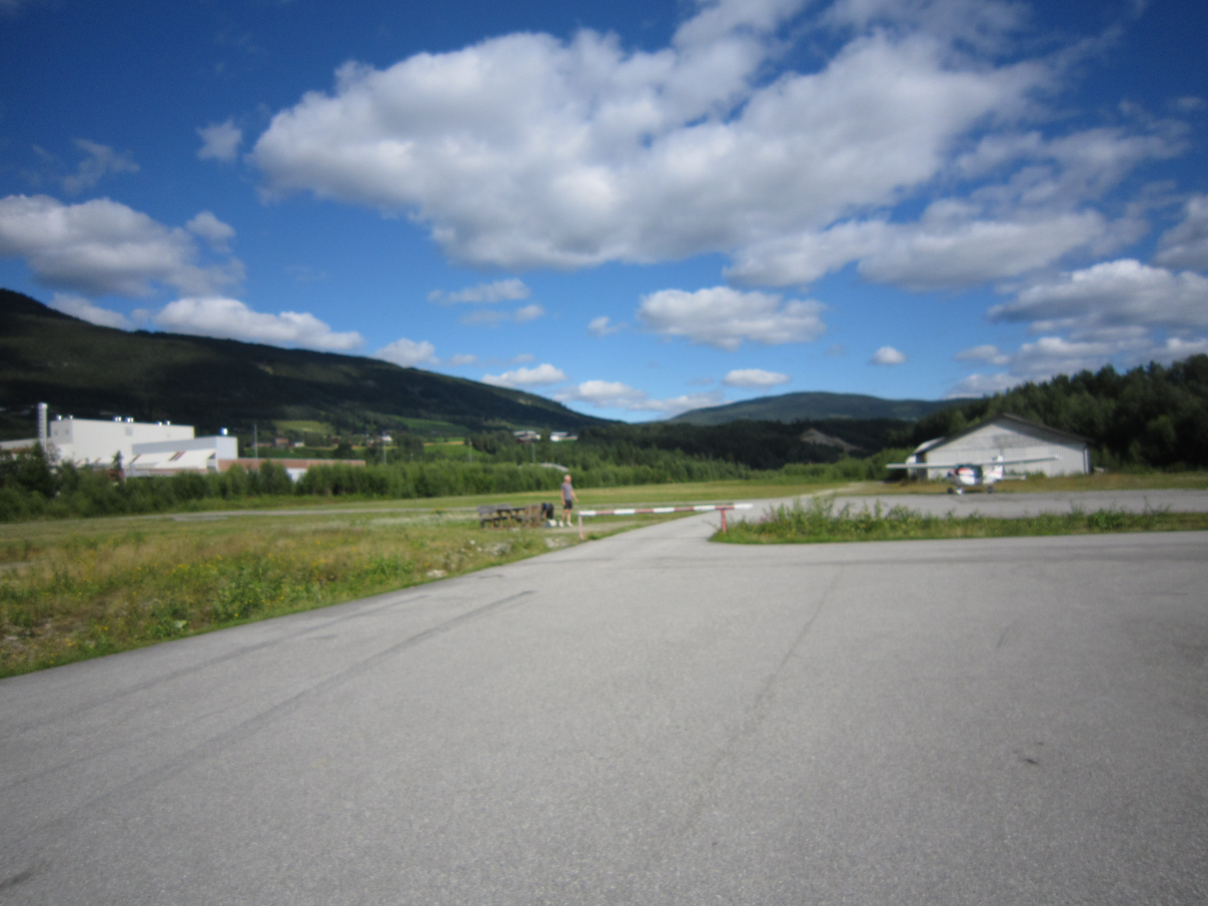 Frya flystripe, Ringebu